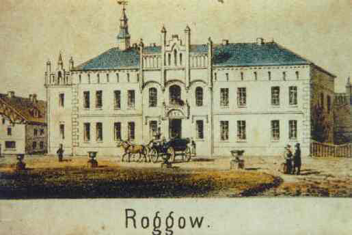 Gutshaus Roggow - historische Ansicht (Stich) Datum: um 1858 Urheber: unbekannter Künstler (Stich) Quelle